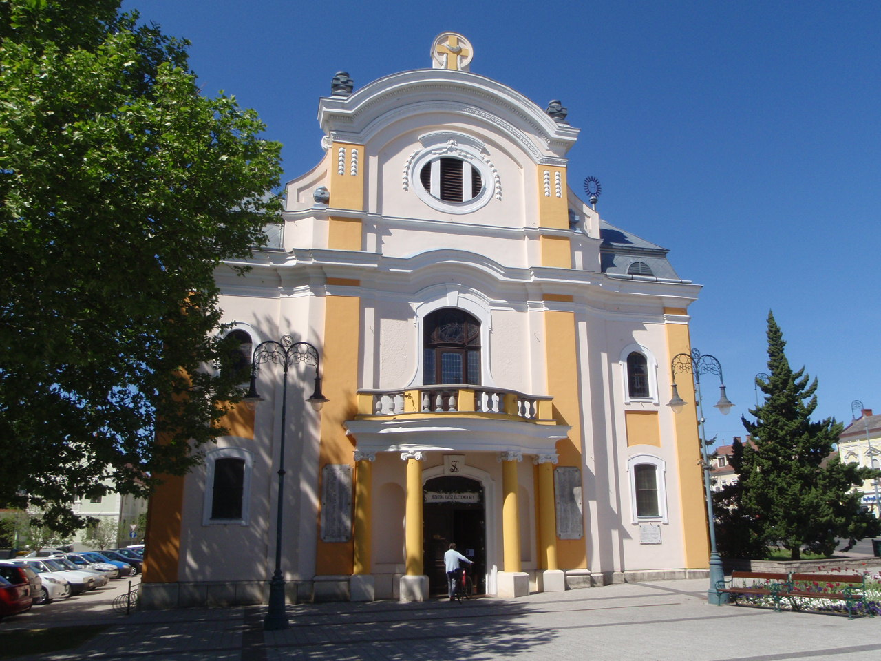 Szent László templom Sárvár